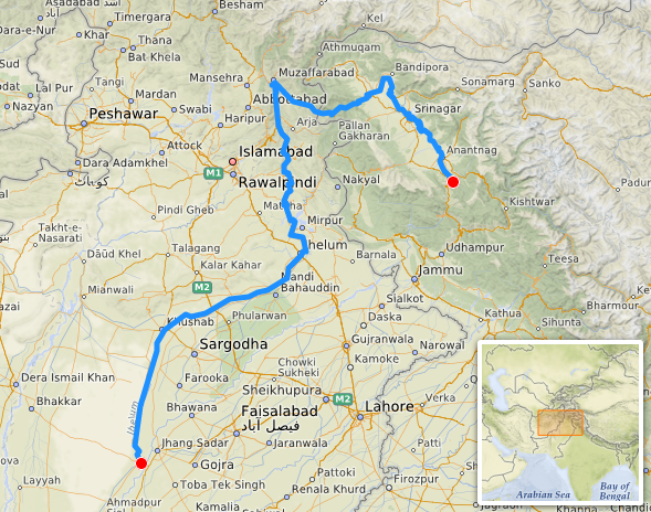 Carte d'après les données openstreetmap This map may be incomplete, and may contain errors. Don't rely solely on it for navigation.